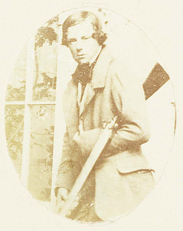 Teitl Cymraeg/Welsh title: John Talbot Dillwyn Llewelyn yn cario dryll Ffotograffydd/Photographer: John Dillwyn Llewelyn (1810-1882) Nodyn/Note: This is part of a larger image. Dyddiad/Date: September 1854. Cyfrwng/Medium: Print taken from a collodion negative. Cyfeiriad/Reference: dil00070 (pb08732/41) Rhif cofnod / Record no.: 3590003 Rhagor o wybodaeth am Ffotograffiaeth Gynnar Abertawe yn Llyfrgell Genedlaethol Cymru More information about Early Swansea Photography at the National Library of Wales